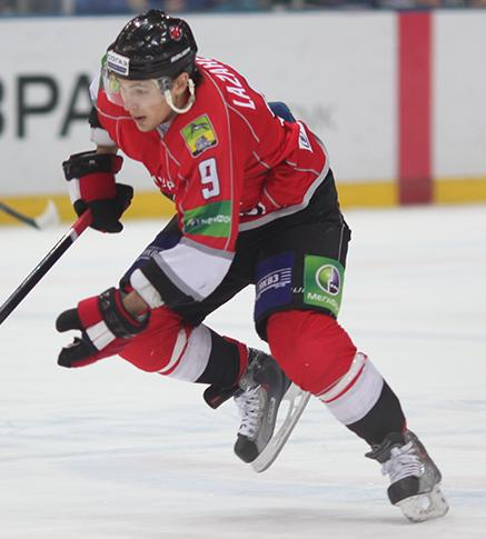 Нападающий новокузнецкого «Металлурга» Антон Лазарев во время матча чемпионата КХЛ против ханты-мансийской «Югры» 5 января 2013 года.